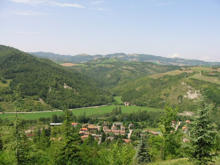 Foto della frazione Savazza del comune di Monterenzio, scattata dalla località Cà di Cabrini. agosto 2002.